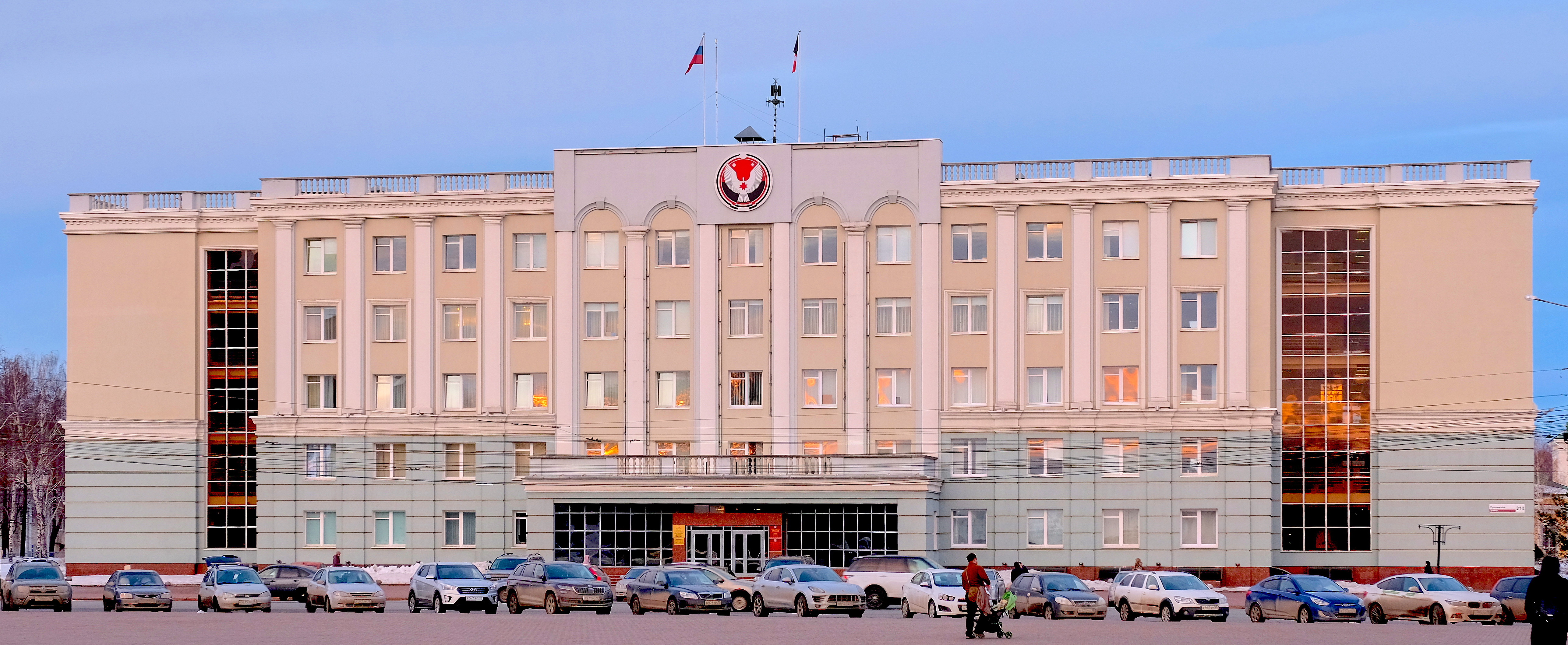 Дом Правительства Удмуртской республики